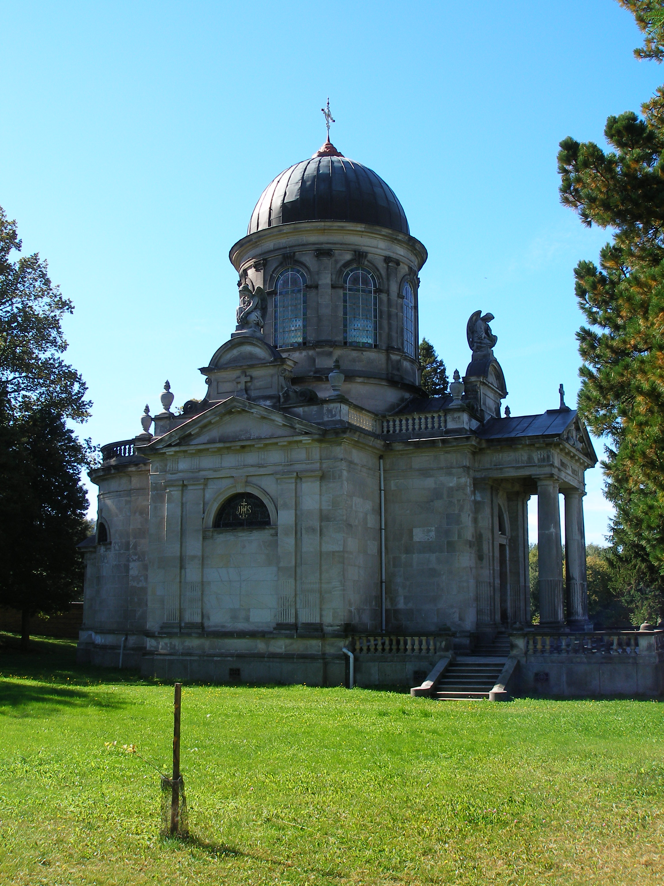 Pohled ze severovýchodu.